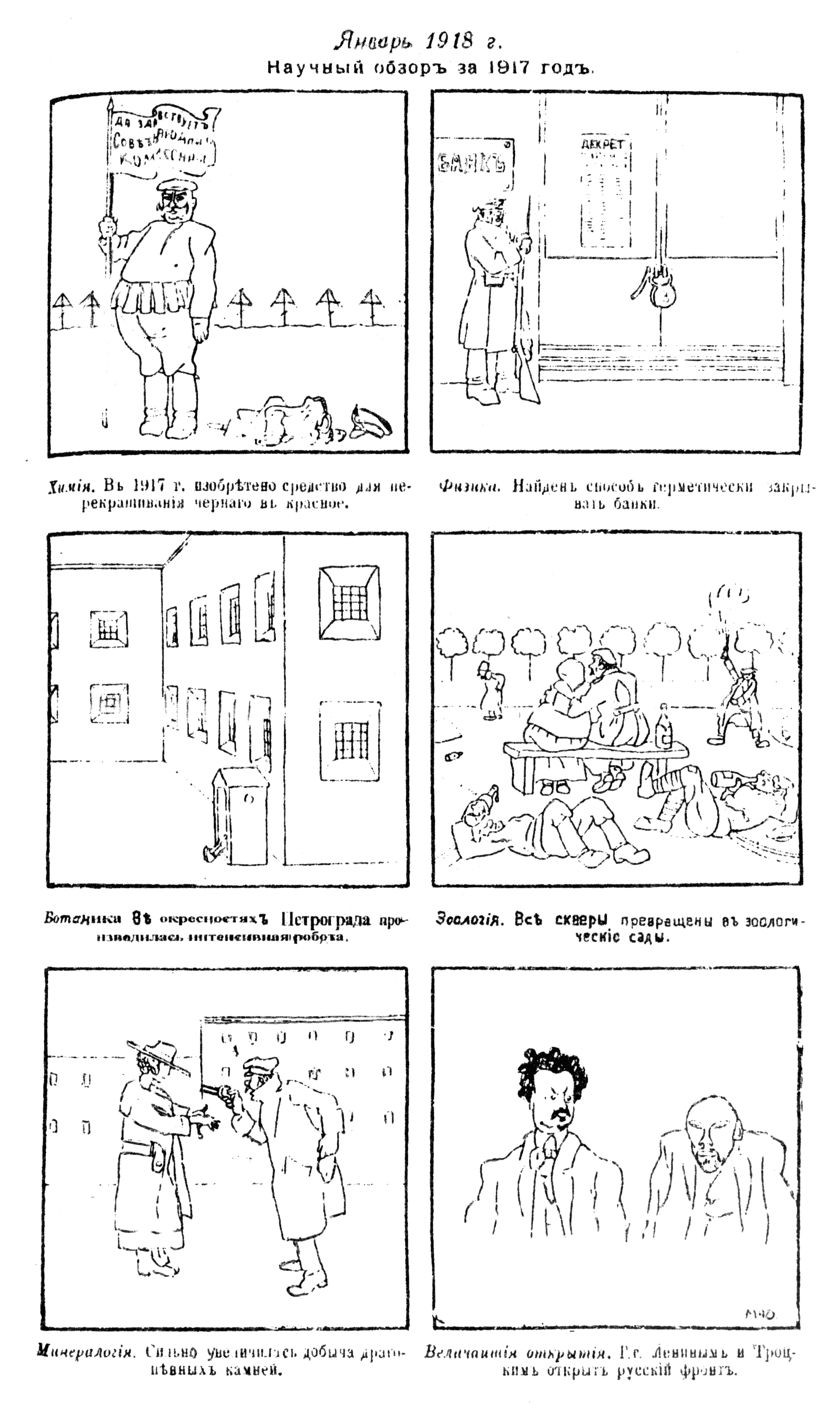 Научный обзор [России] за 1917 год. Рисунок из одесского журнала, январь 1918 года. Химия. В 1917 г. изобретено средство для перекрашивания чёрного в красное [сбросил чёрную полицейскую форму и стал красным под красным флагом с надписью «Да здравствует Совет народных комиссаров»]. Физика. Найден способ герметически закрывать банки [декрет СНК о национализации банков]. Ботаника. В окрестностях Петрограда производилась интенсивная работа [прополка либо посадка буржуазных элементов]. Зоология. Все скверы превращены [простолюдинами] в зоологические сады. Минералогия. Сильно увеличилась добыча драгоценных камней [налётчиками]. Величайшия открытия. Г.г. Лениным и Троцким открыт [немцам] русский фронт [ПМВ].